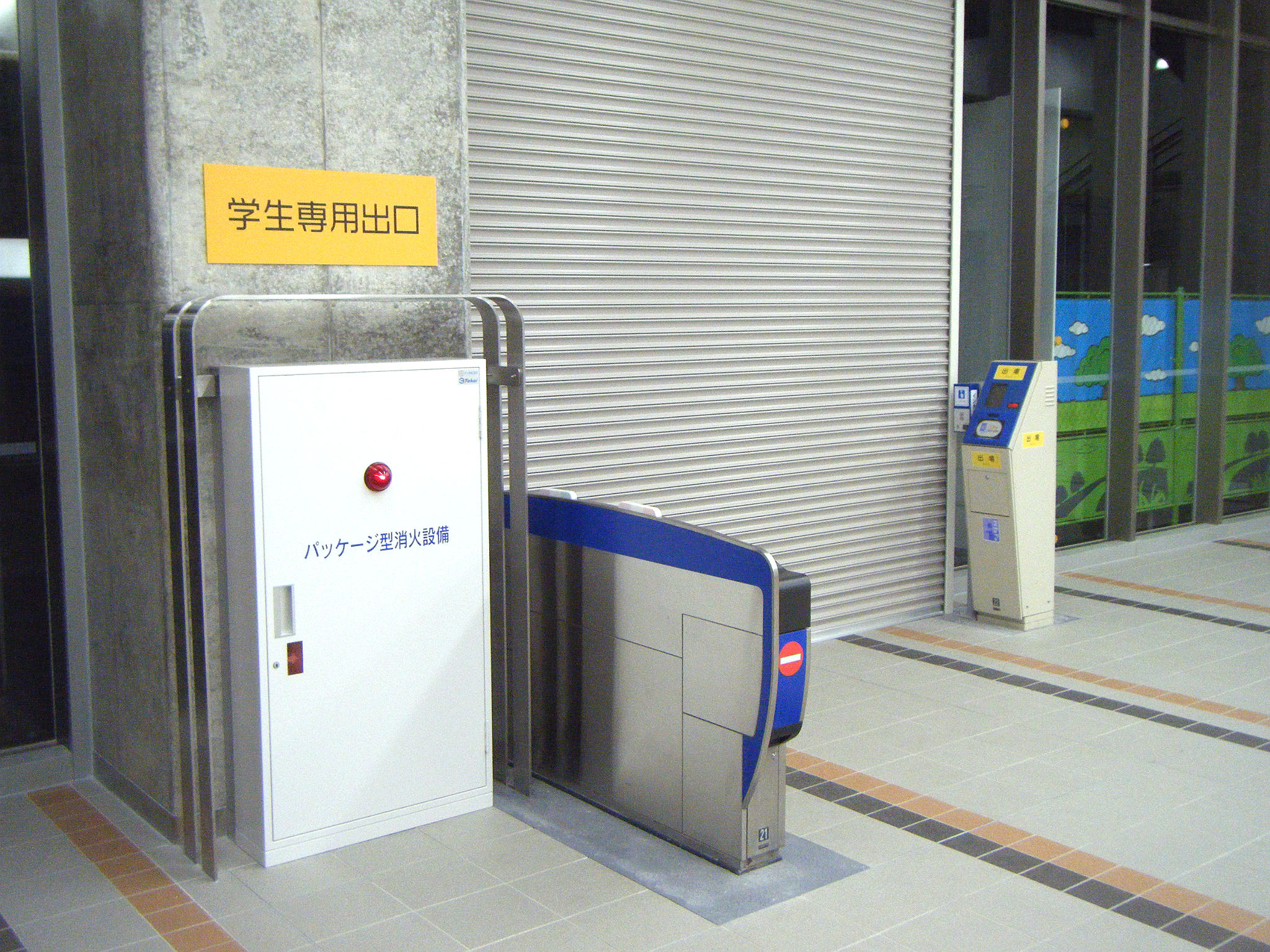 阪神鳴尾駅 臨時改札口